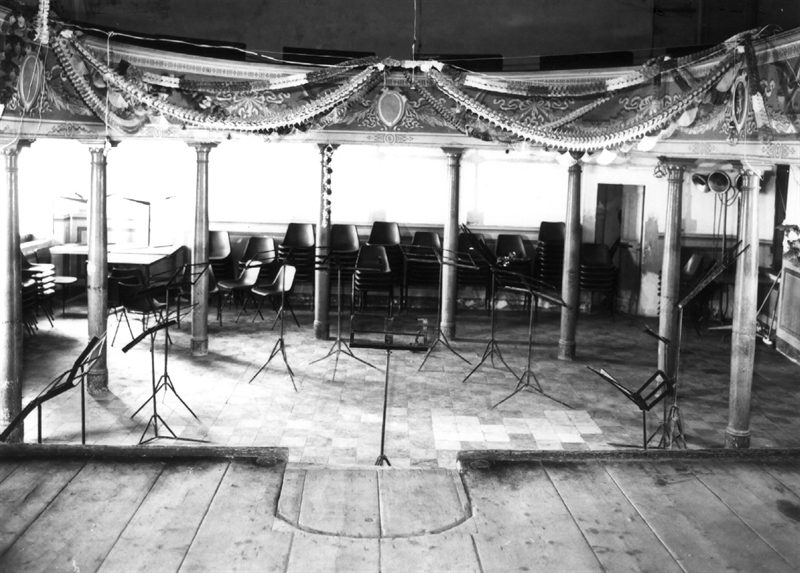 Un'immagine del teatro negli anni'60